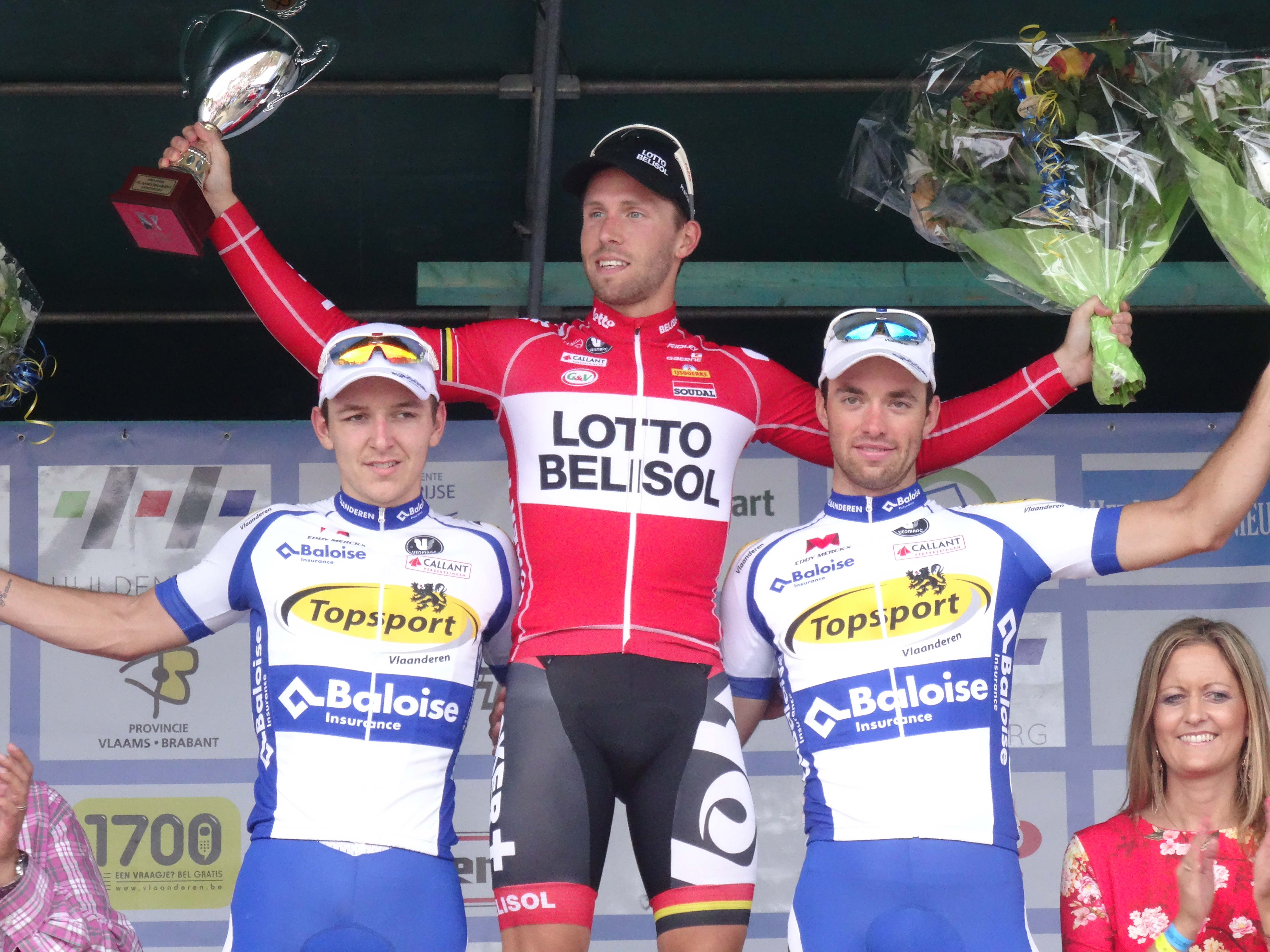 Reportage photographique réalisé le mercredi 27 août à l'occasion de l'arrivée de la Druivenkoers Overijse 2014 à Overijse, Belgique.